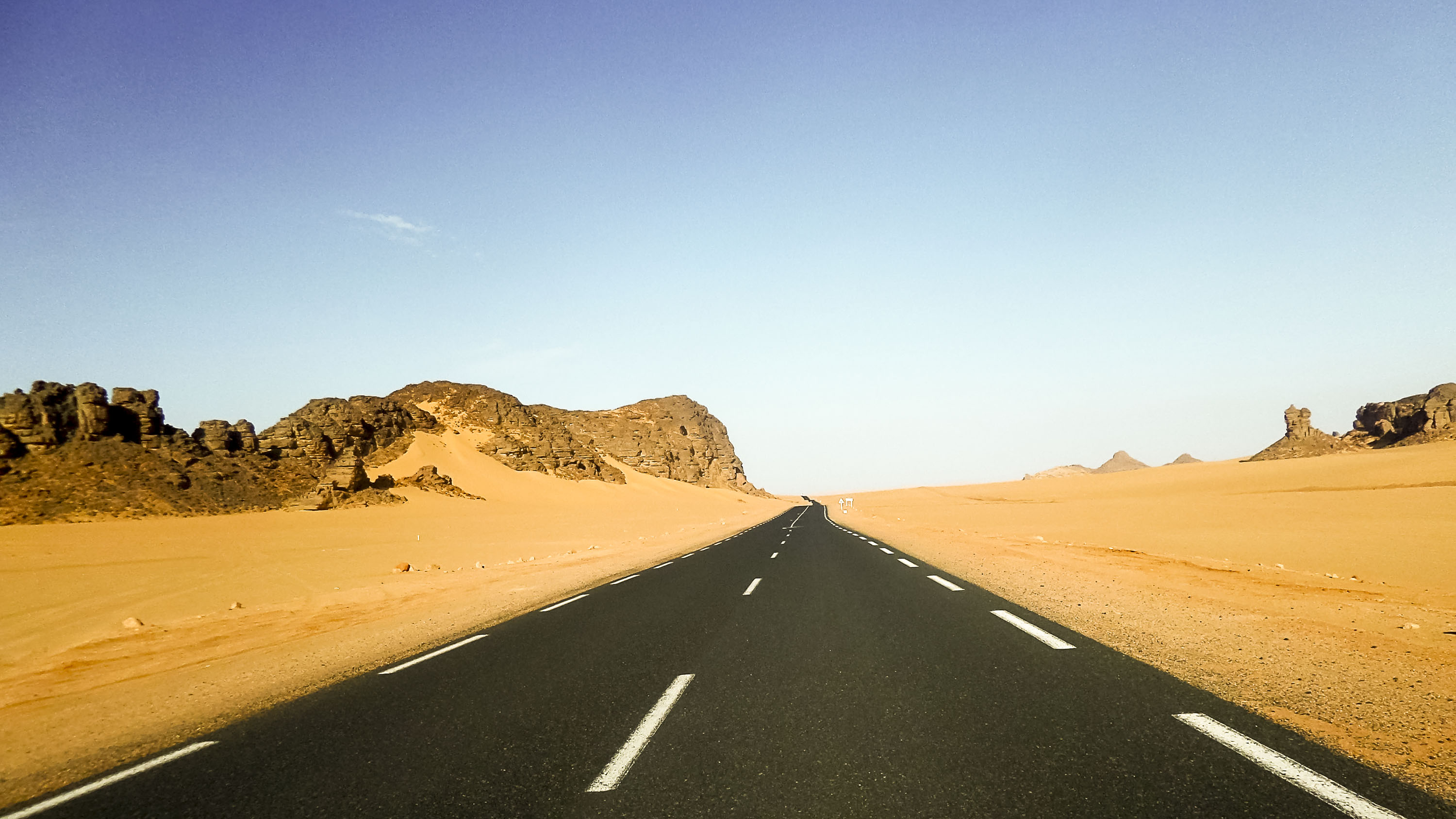 RN 3, Djanet جانت